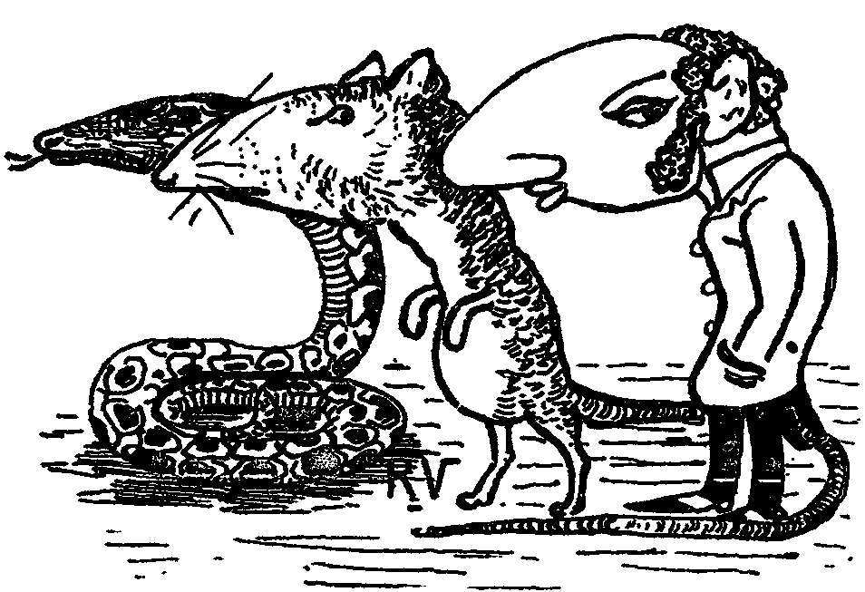 Gravure antisémite d'après un dessin de Raphaël Viau.